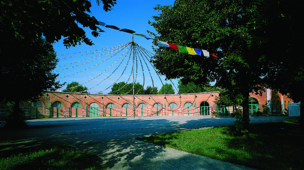 Ausstellungszentrum Lokschuppen Rosenheim